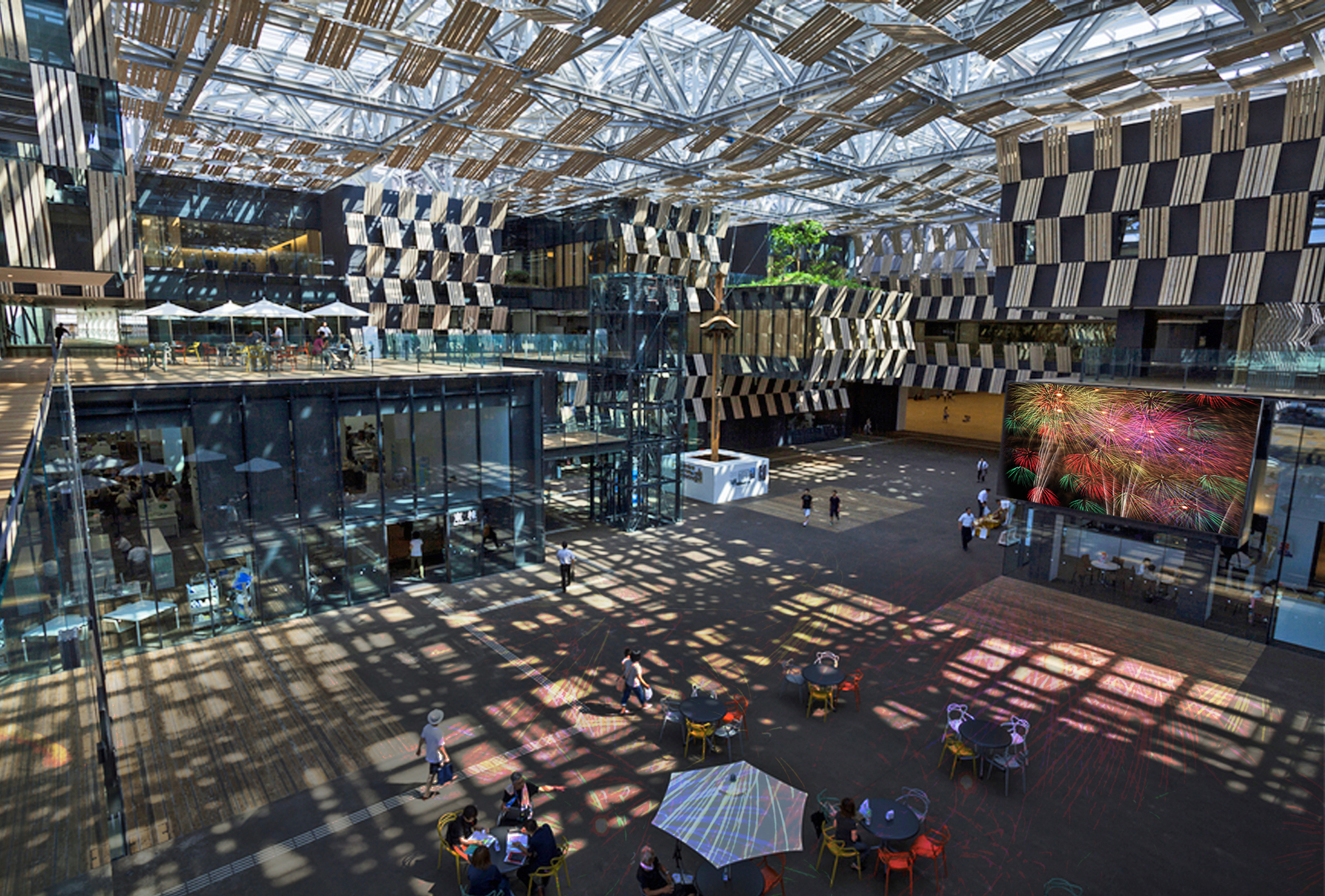 2012y 竣工のアオーレ長岡。今後の地域イベントの目玉になるか？